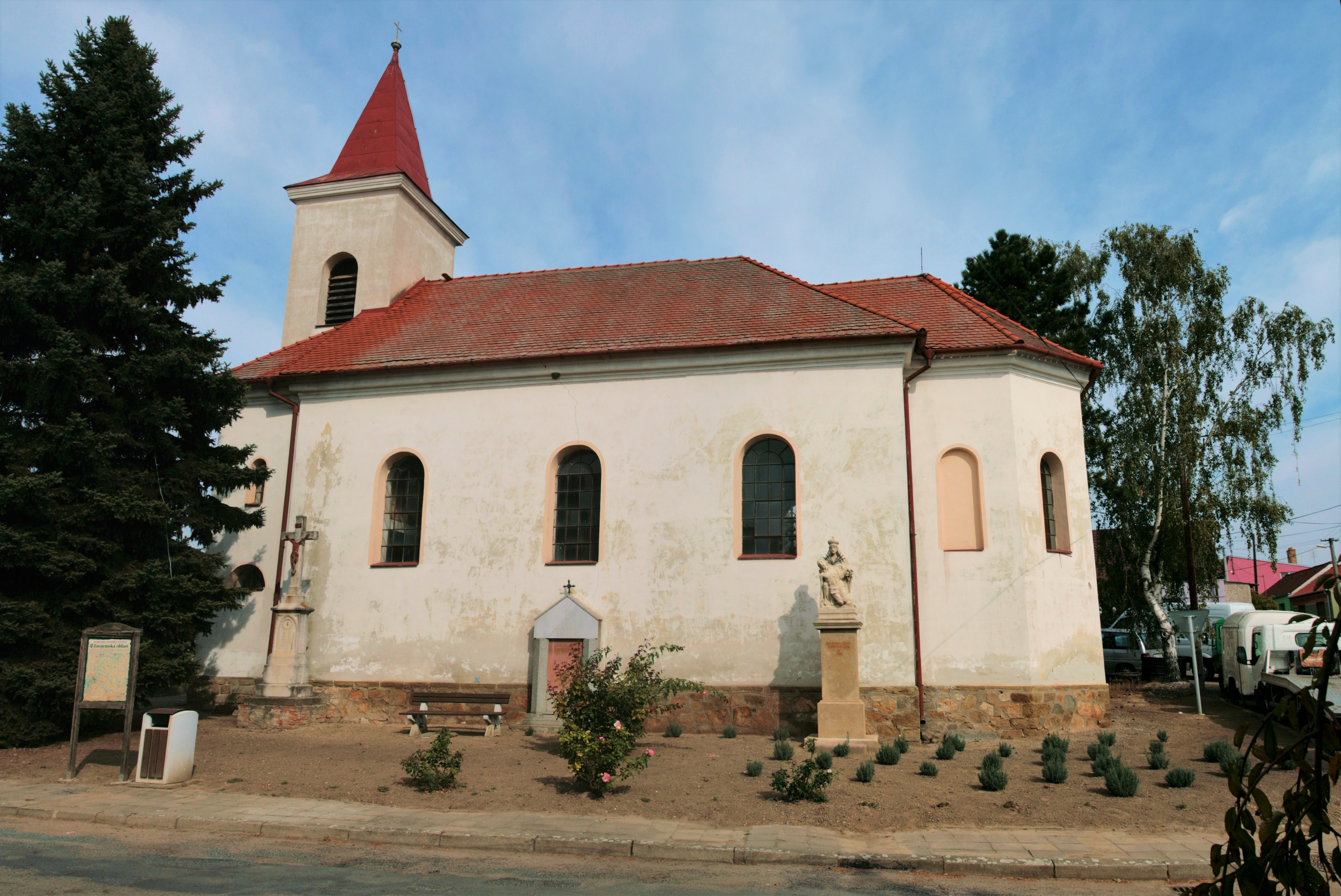 Obec Kubšice v okrese Znojmo, mezi Pohořelicemi a Moravským Krumlovem. Kostel Panny Marie Bolestné na návsi, pohled z jihu od obecního úřadu.